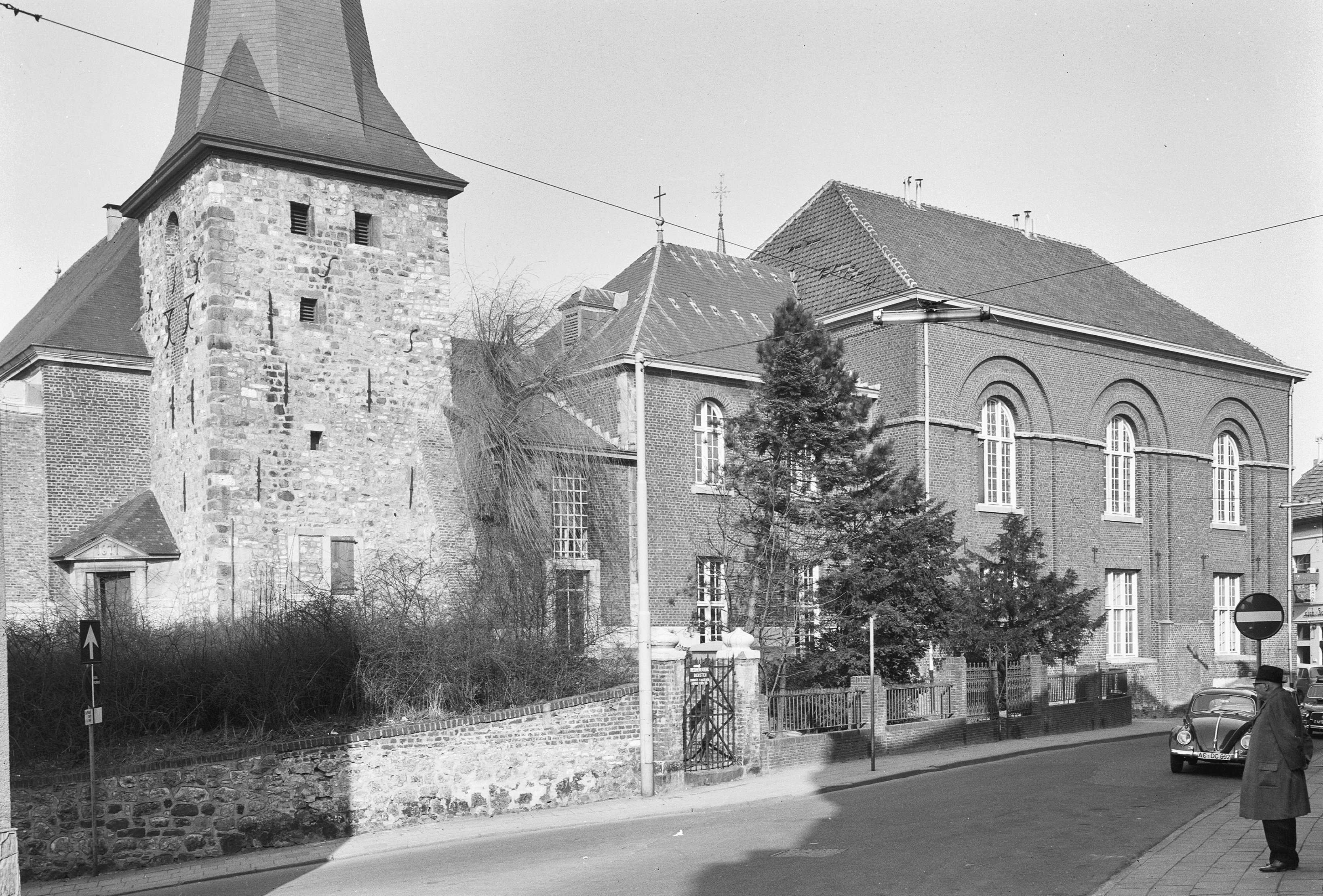 Nederlands Hervormde Kerk: exterieur, Kerkstraat 47